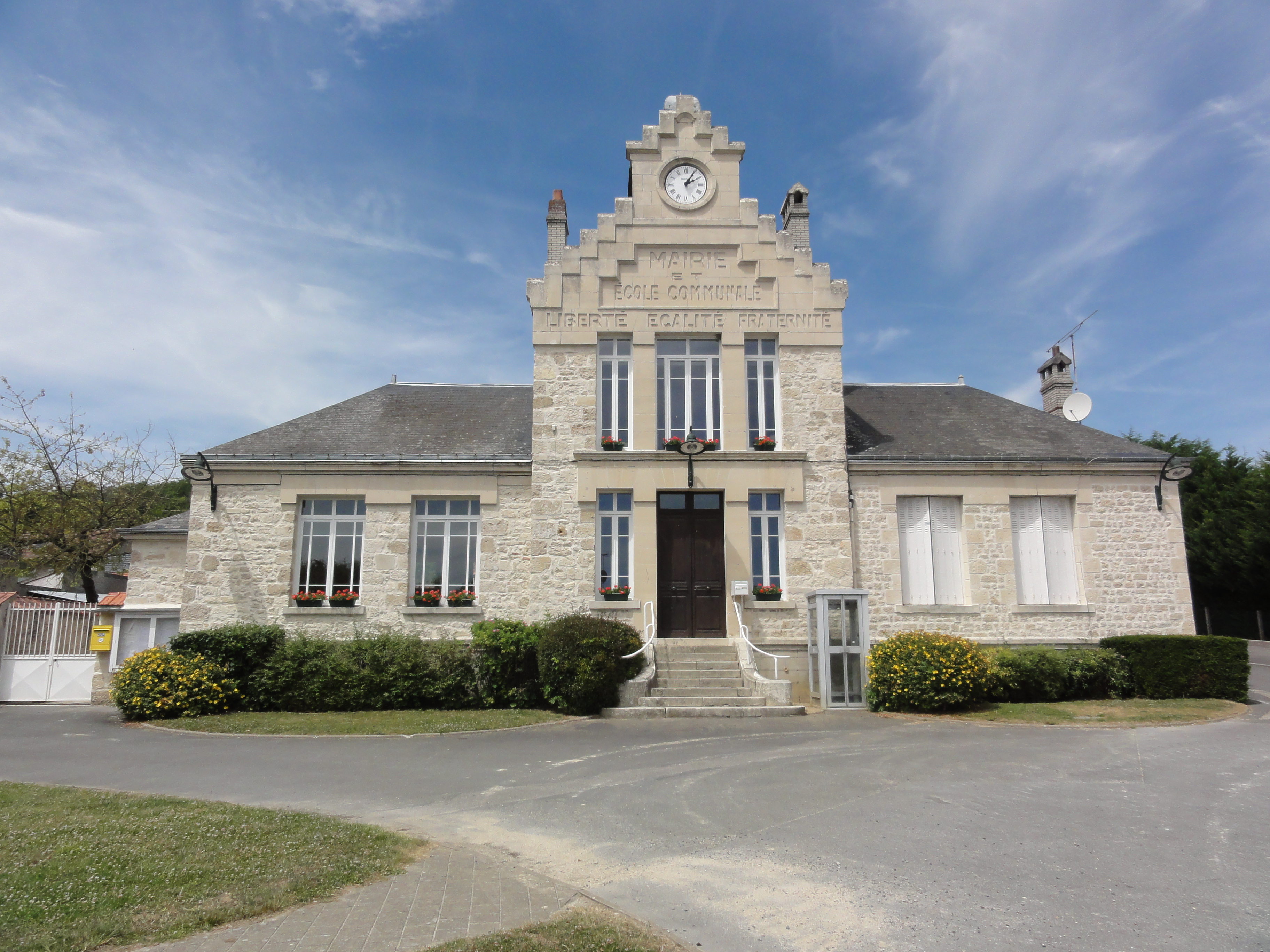 Vendresse-Beaulne (Aisne) mairie-école